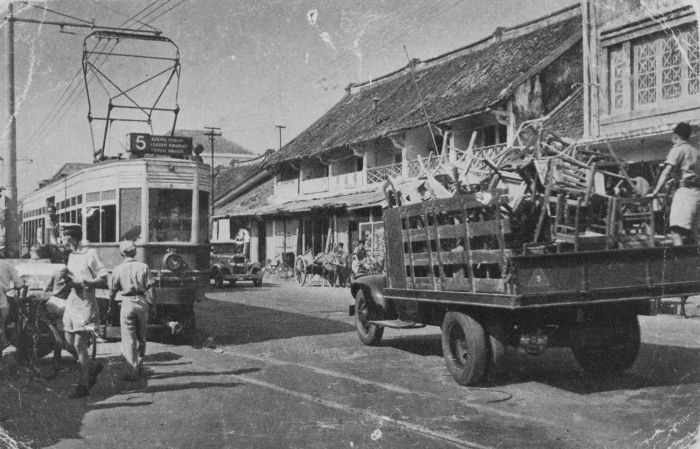 Foto. Straatgezicht met tram en pick-up